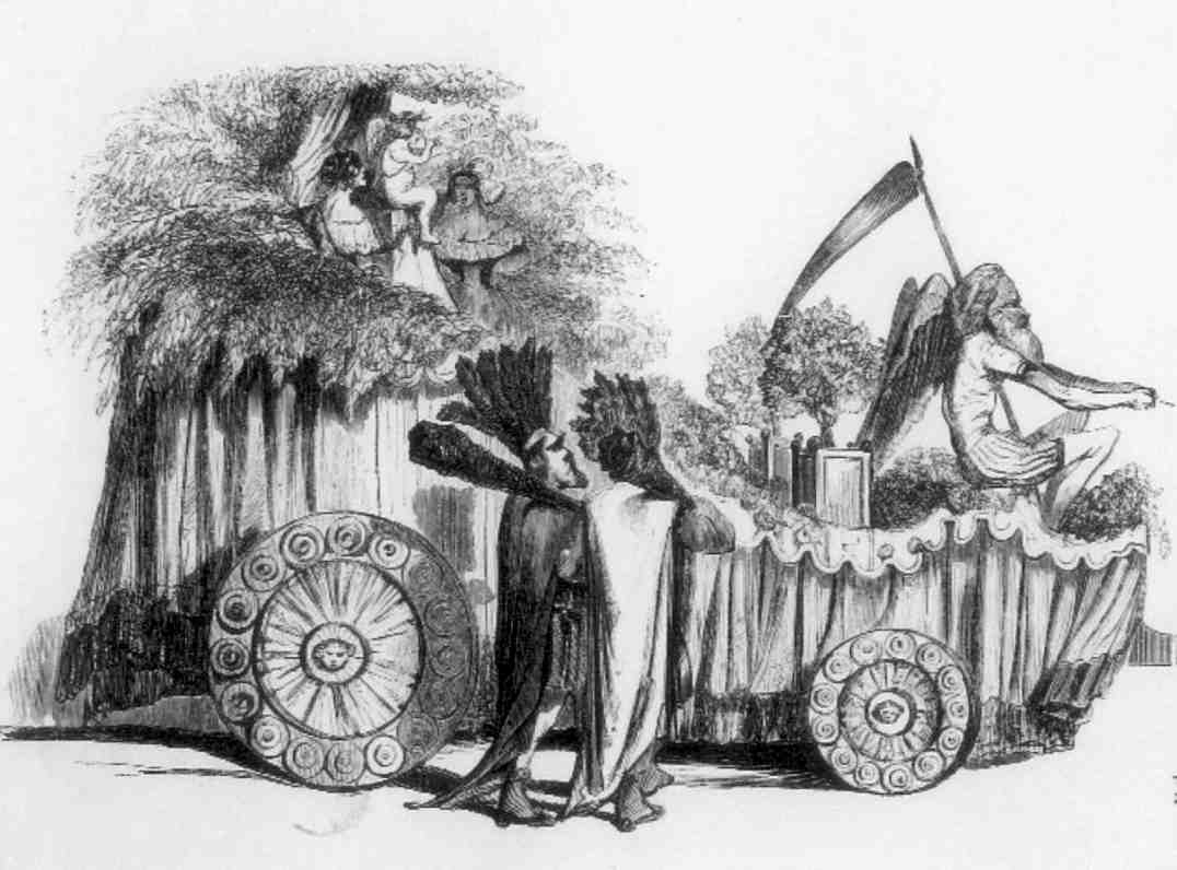 Le char du Temps, vieillard avec sa faux dans le cortège du Bœuf Gras du Carnaval de Paris. Au premier plan deux sacrificateurs.